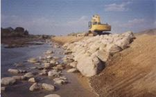 Construyendo el enrocado de protección de un dique